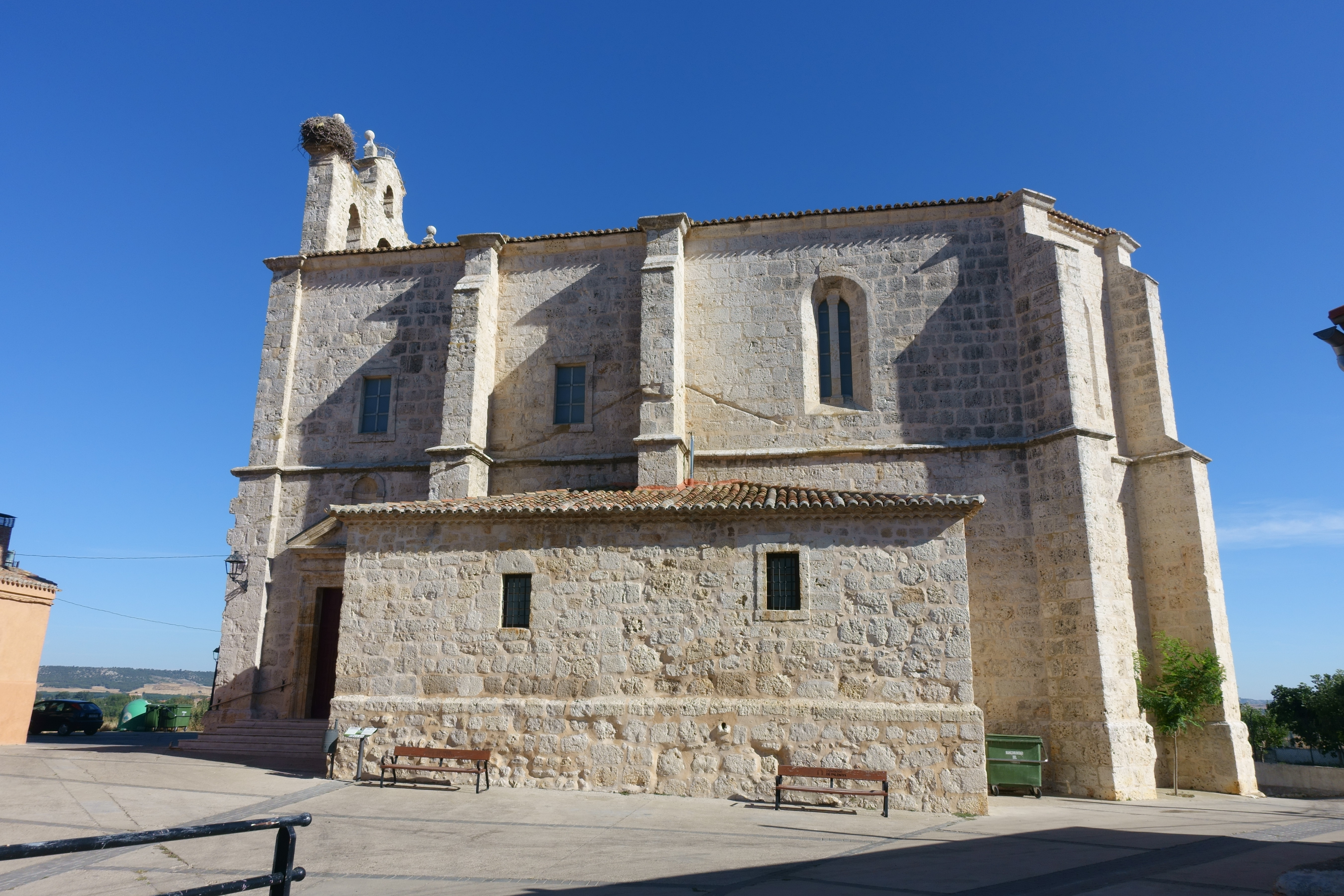 Iglesia de San Miguel, en Tariego de Cerrato (Palencia, España).